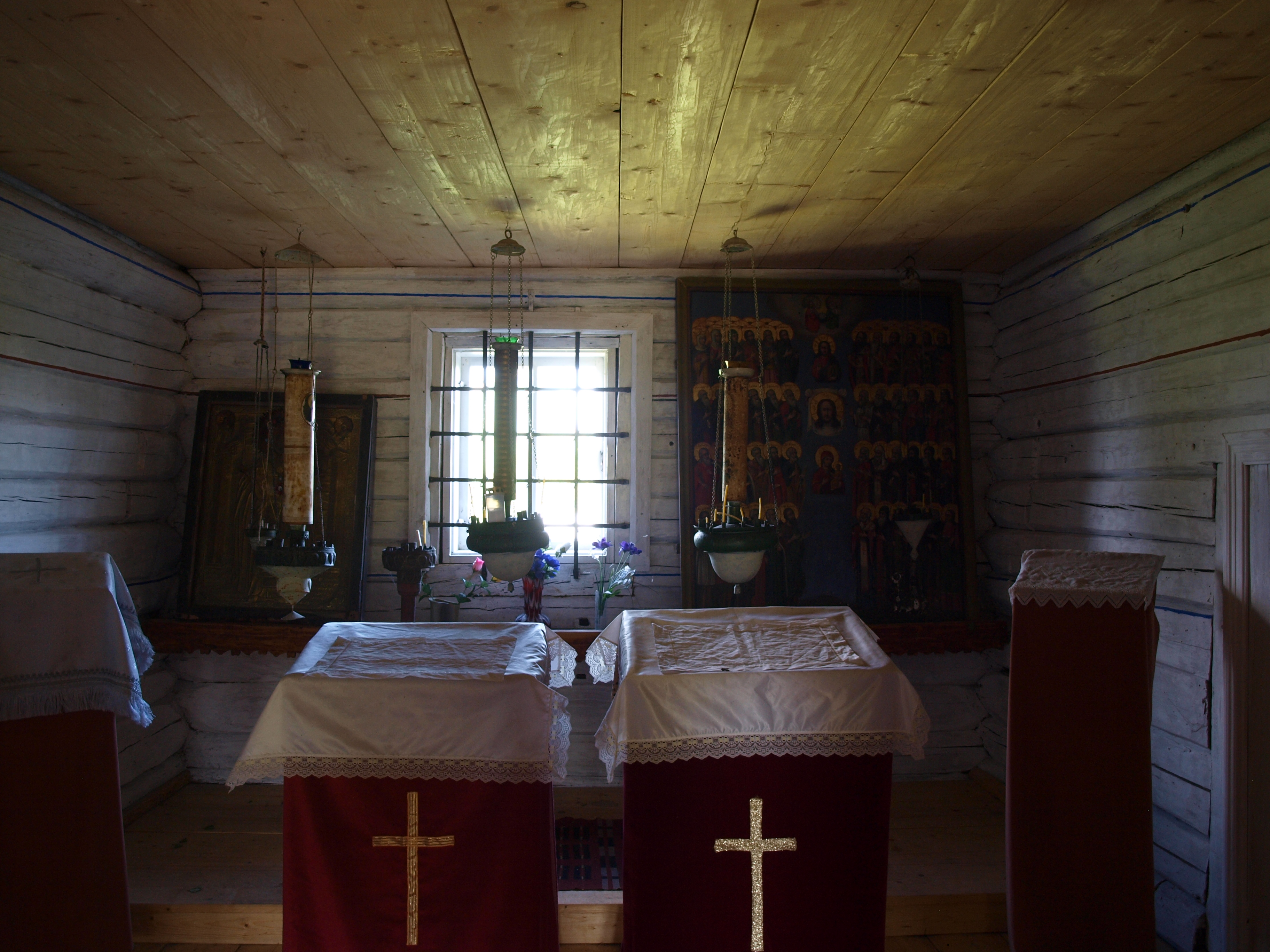 Võõpsu tsässona altariruum 2015. aastal